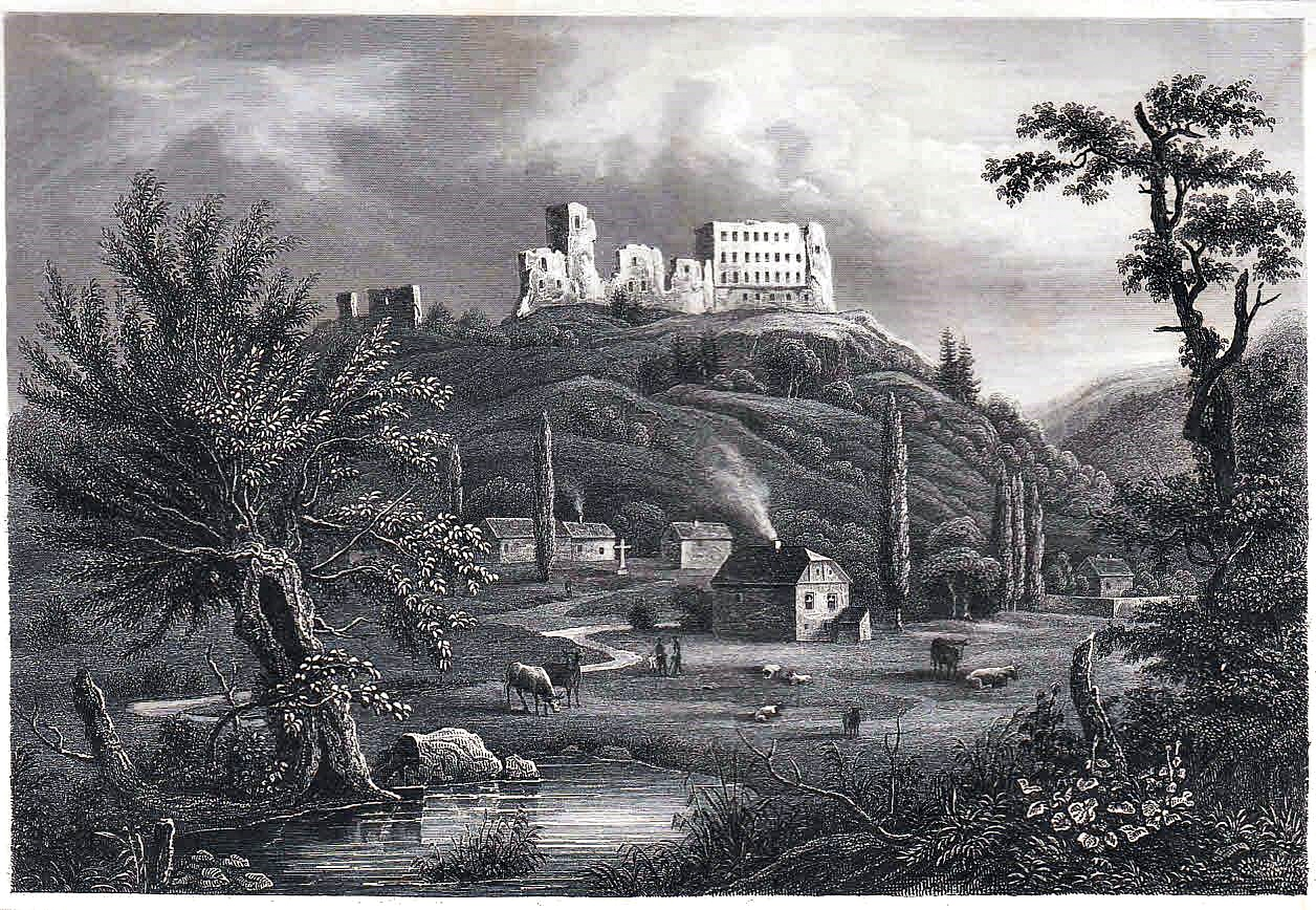 Burgruine Altleiningen, Stahlstich um 1840